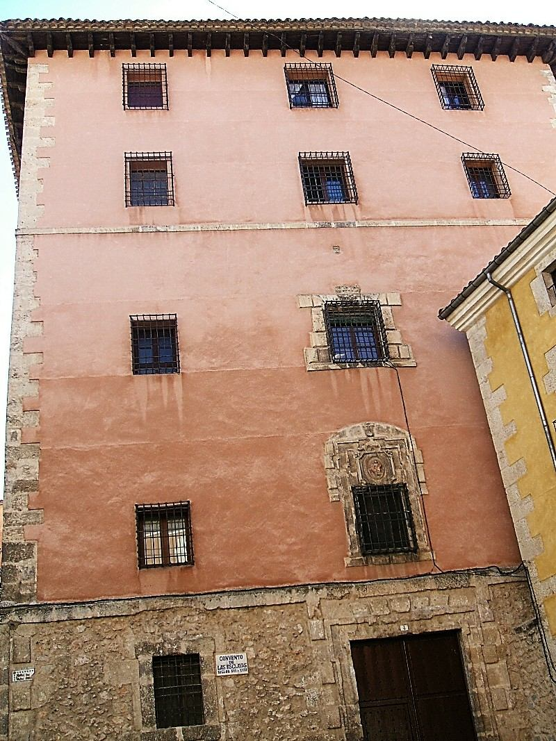 Convento de las Esclavas del Santísimo Sacramento (antiguo Convento de la Merced), en Cuenca (España)